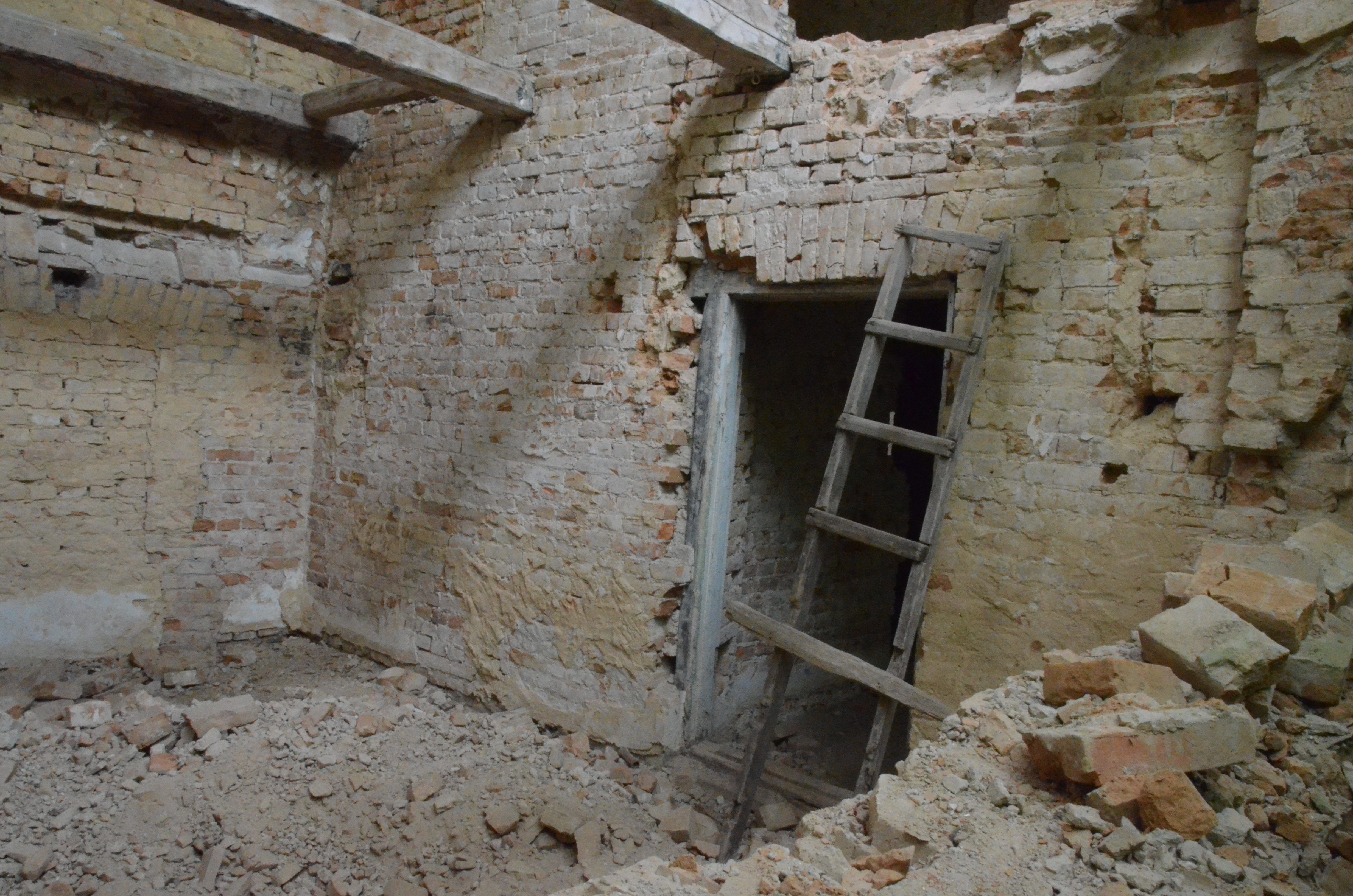 Садибний будинок Марко Вовчок (мур.), село Хохітва